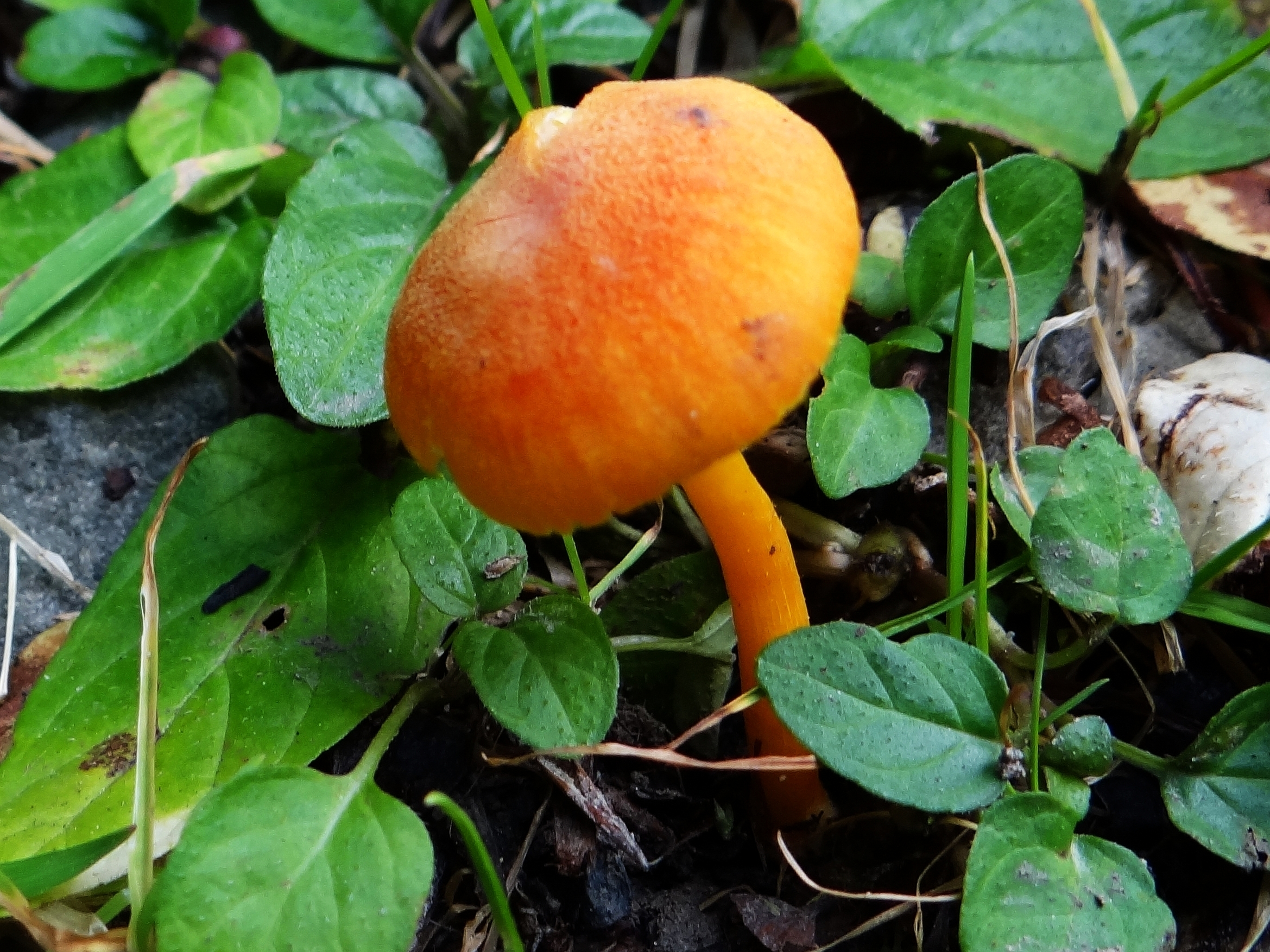 Hygrocybe miniata (location: Poland, Gorce, dolina Markowego Potoku)